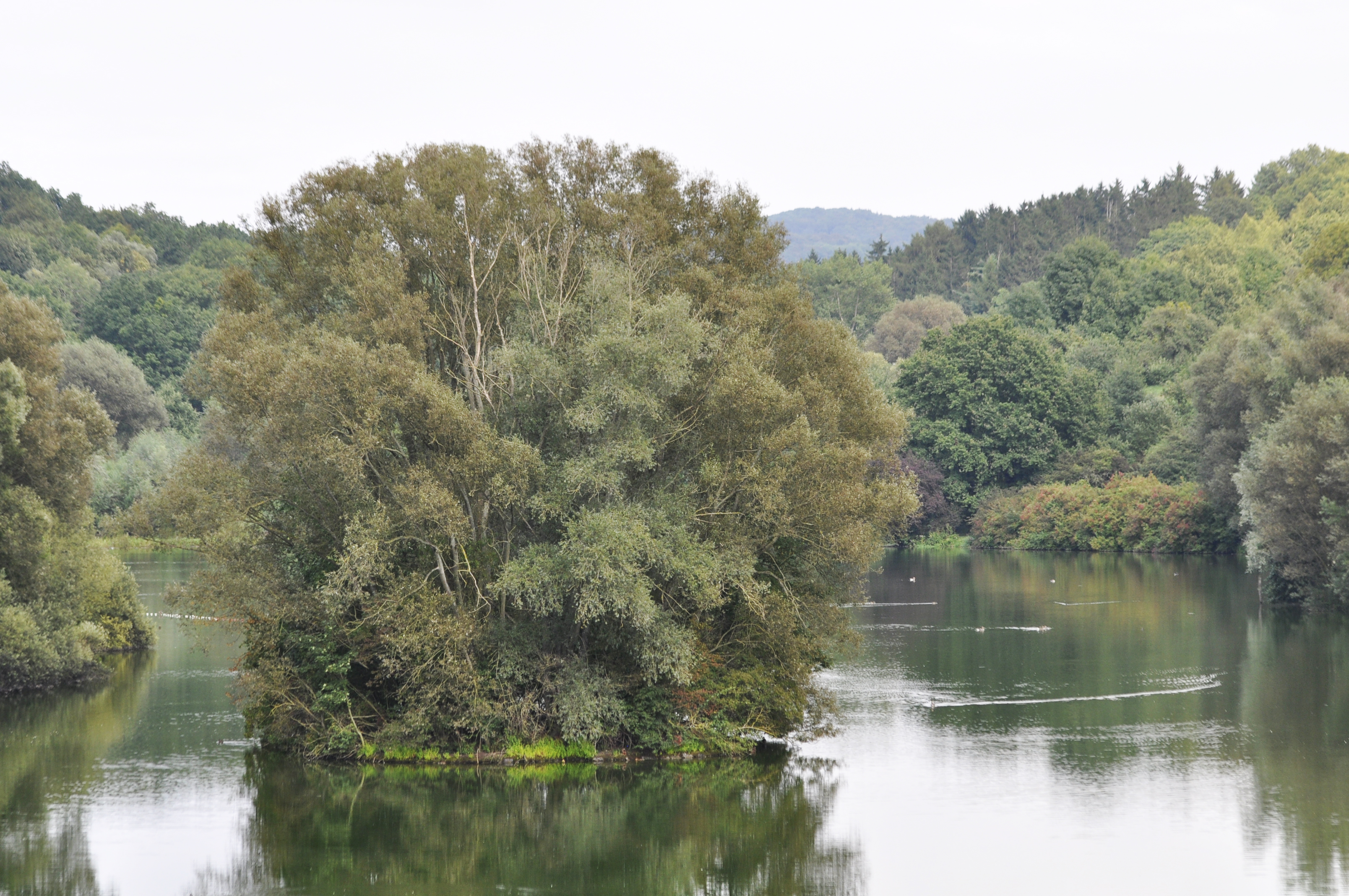 Wendebachstausee bei Göttingen, Blick vom Staudamm auf die unter Naturschutz stehende Insel, 23.8.2014. Foto: F. Welter-Schultes